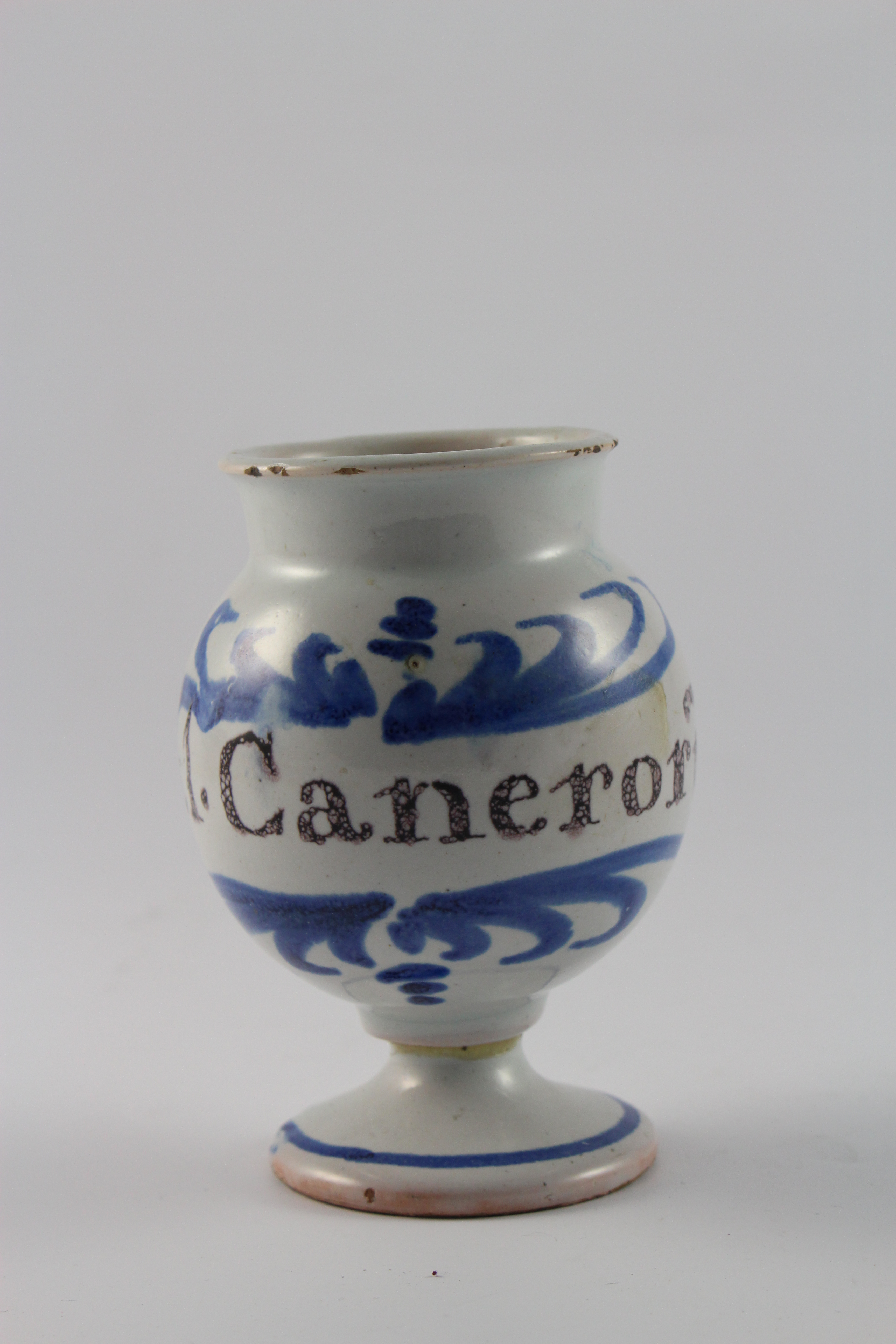 Sel Caneroru (écrevisses) - pilulier